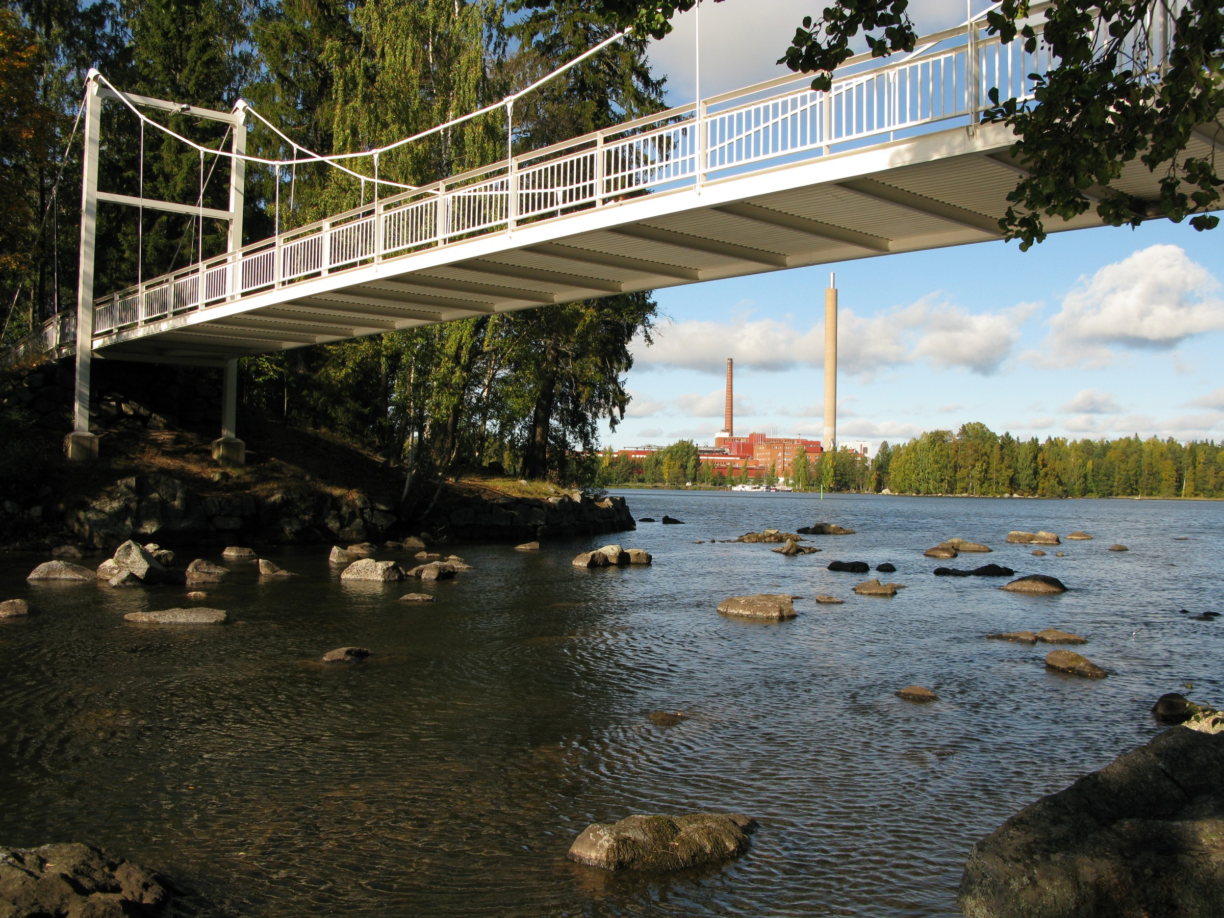 Apianlahti in Valkeakoski, Finland.